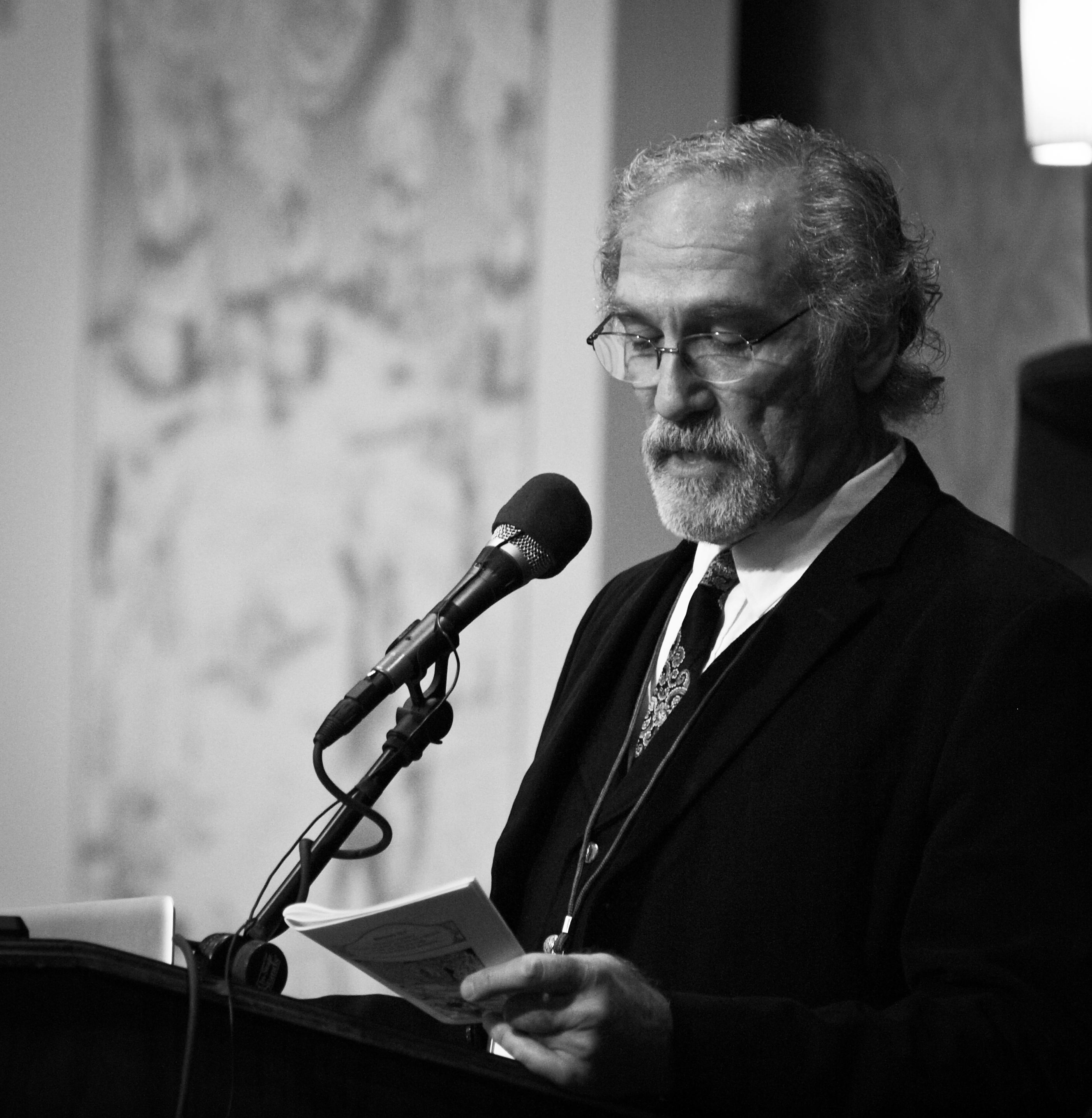 Cartoonist Mike Konopacki Madison, WI